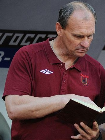 Виталий Кафанов тренер ФК Рубин